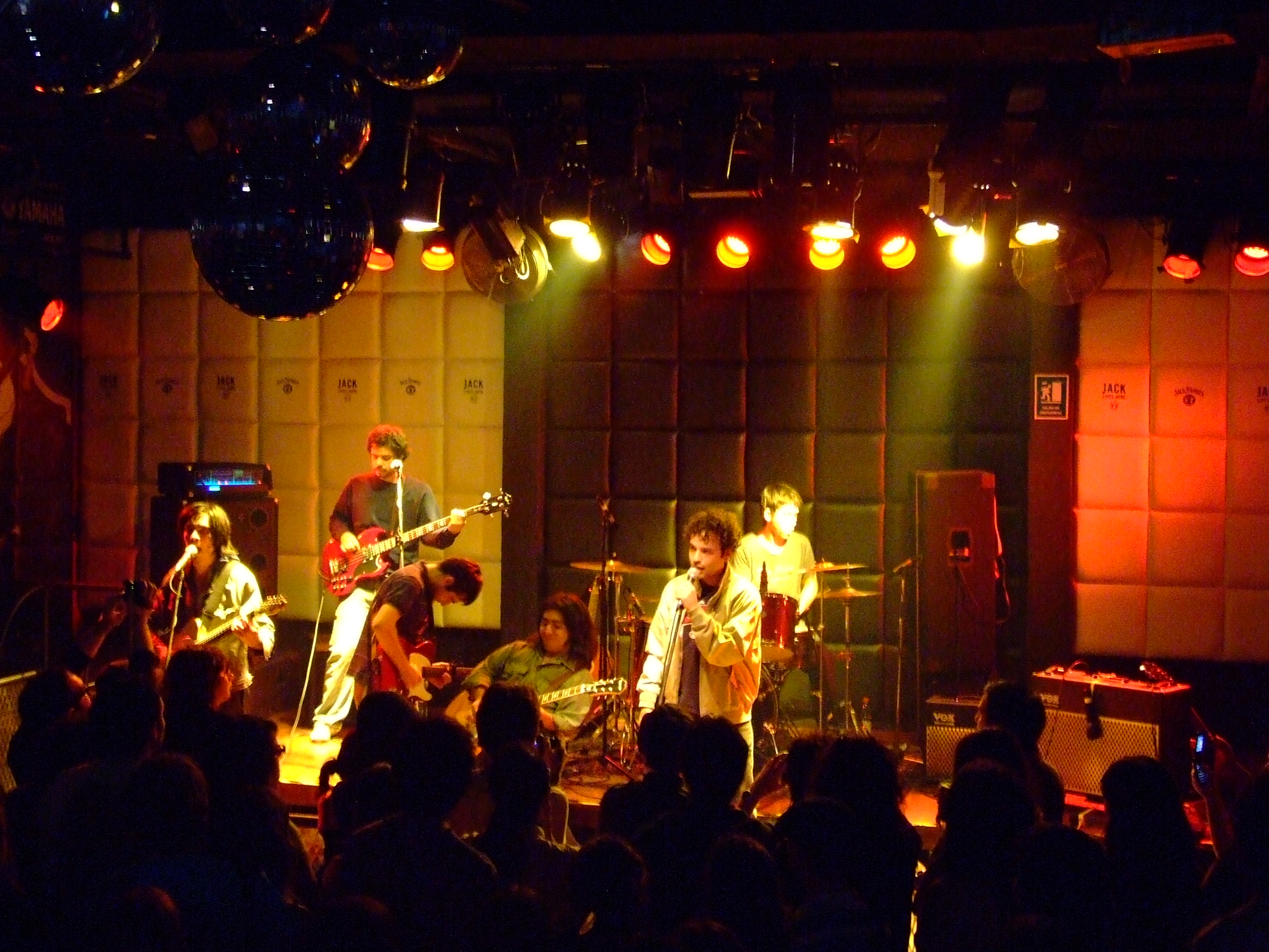 Fother Muckers en vivo.